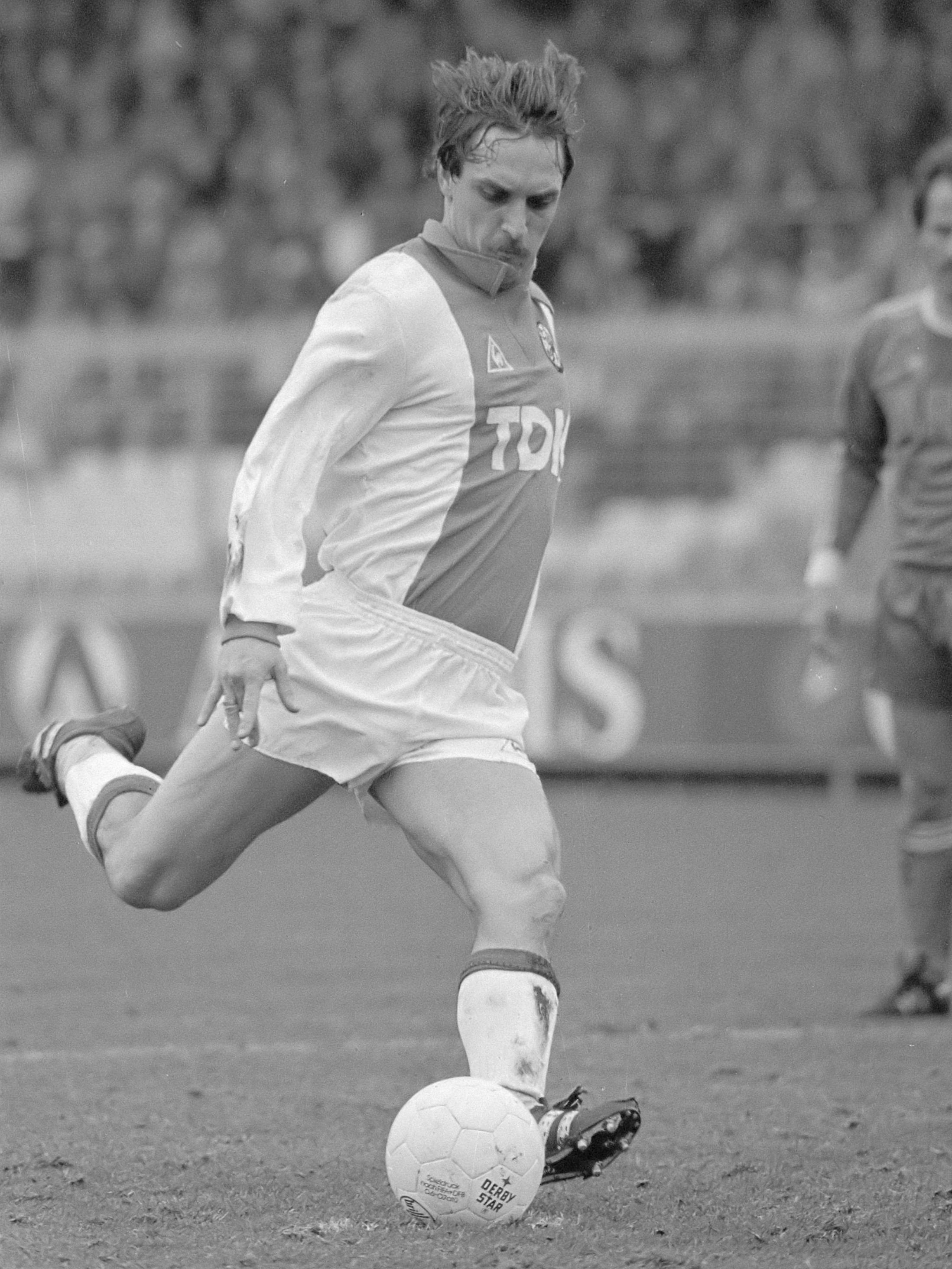 Ajax tegen FC Twente. Edo Ophof (Ajax) scoort uit penalty 20 maart 1983